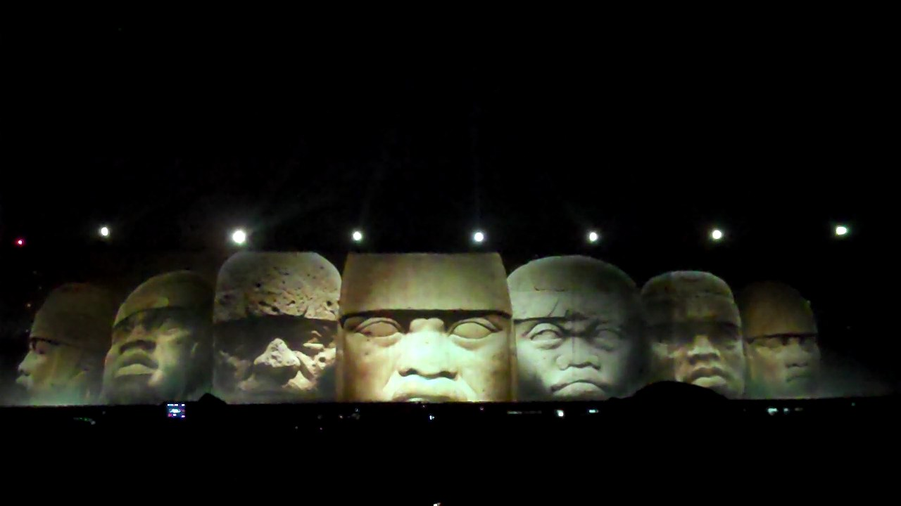 Espectaculo por el Bicentenario de la Independencia de Mexico.